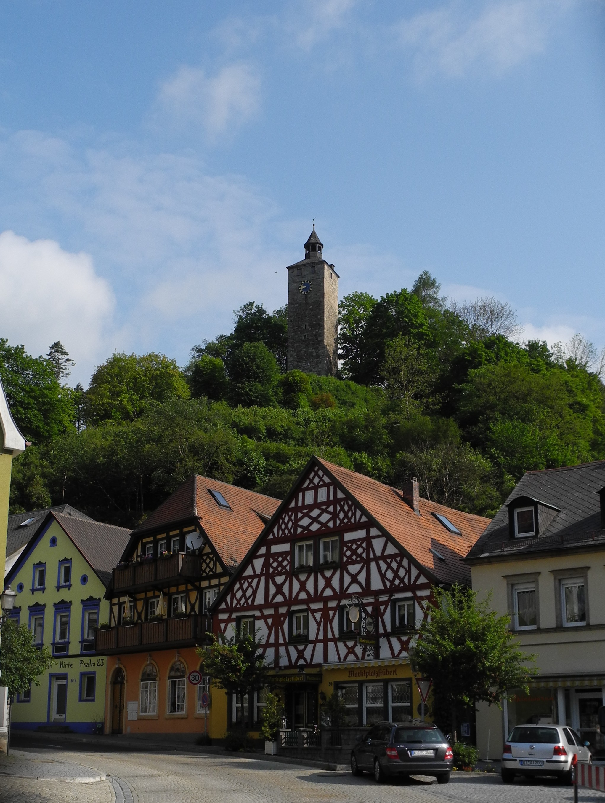 Bad Berneck-Walpoten-Burgturm, Fachwerkhäuser